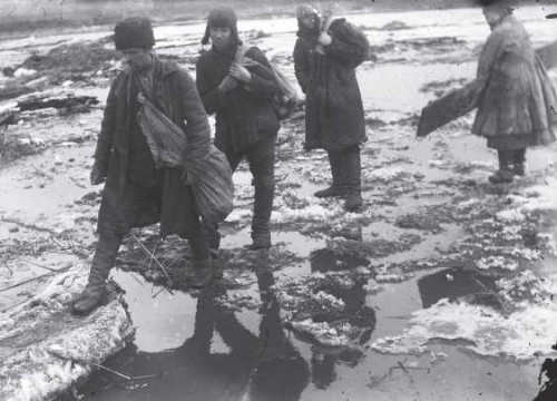 1930-е. Раскулаченные крестьяне с. Удачное, Донецкая область